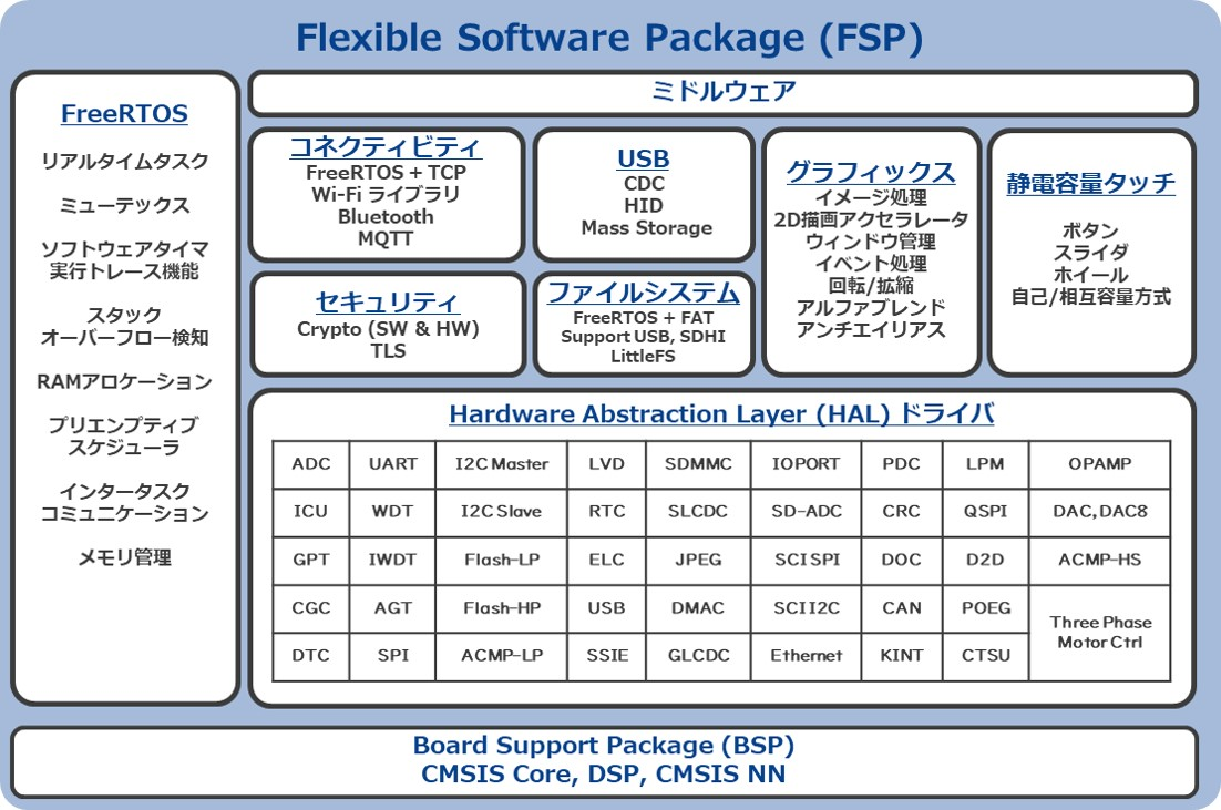 Renesas RAファミリに付随して無償提供されるFlexible Software Packageの概略図